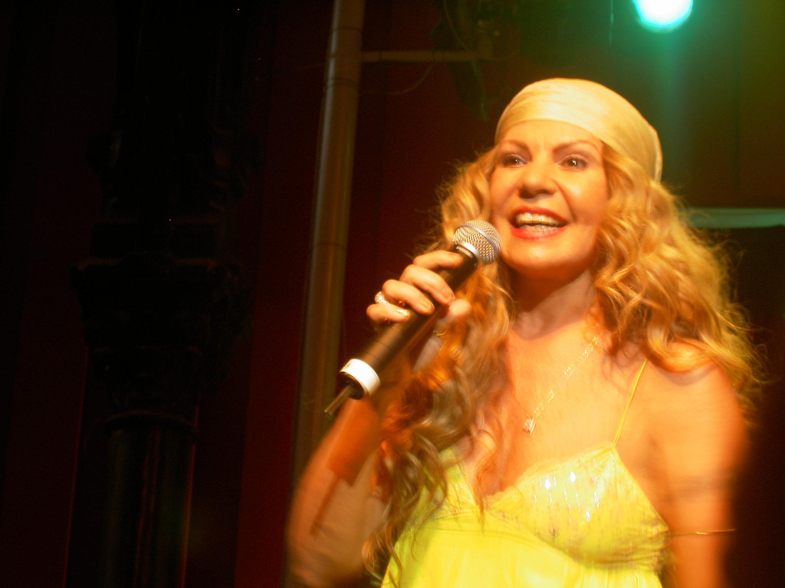 Elba Ramalho, em apresentação com Cidade Negra no "Espaço Brasil" em 17 de Julho de 05.